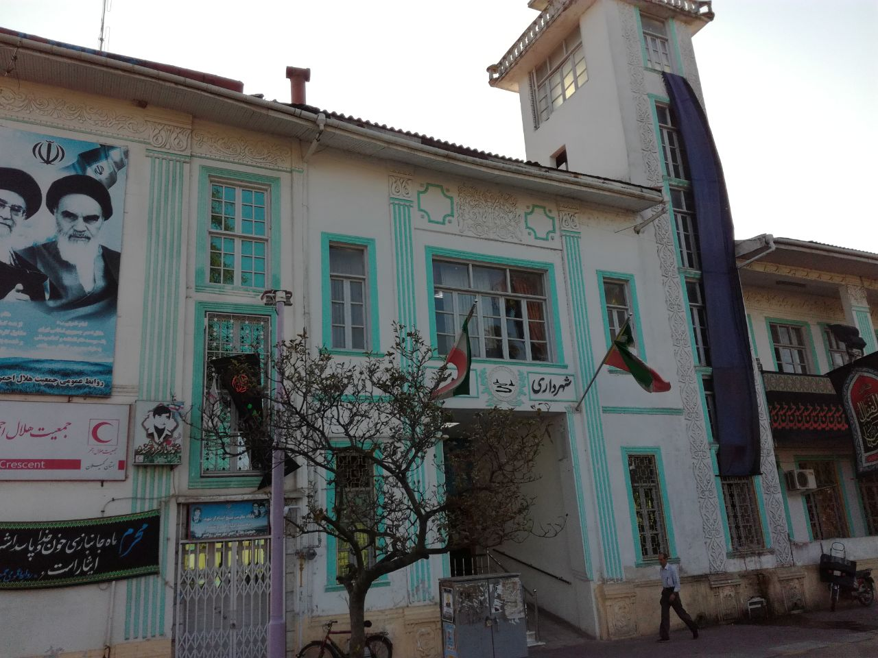 عمارت شهرداری رودسر